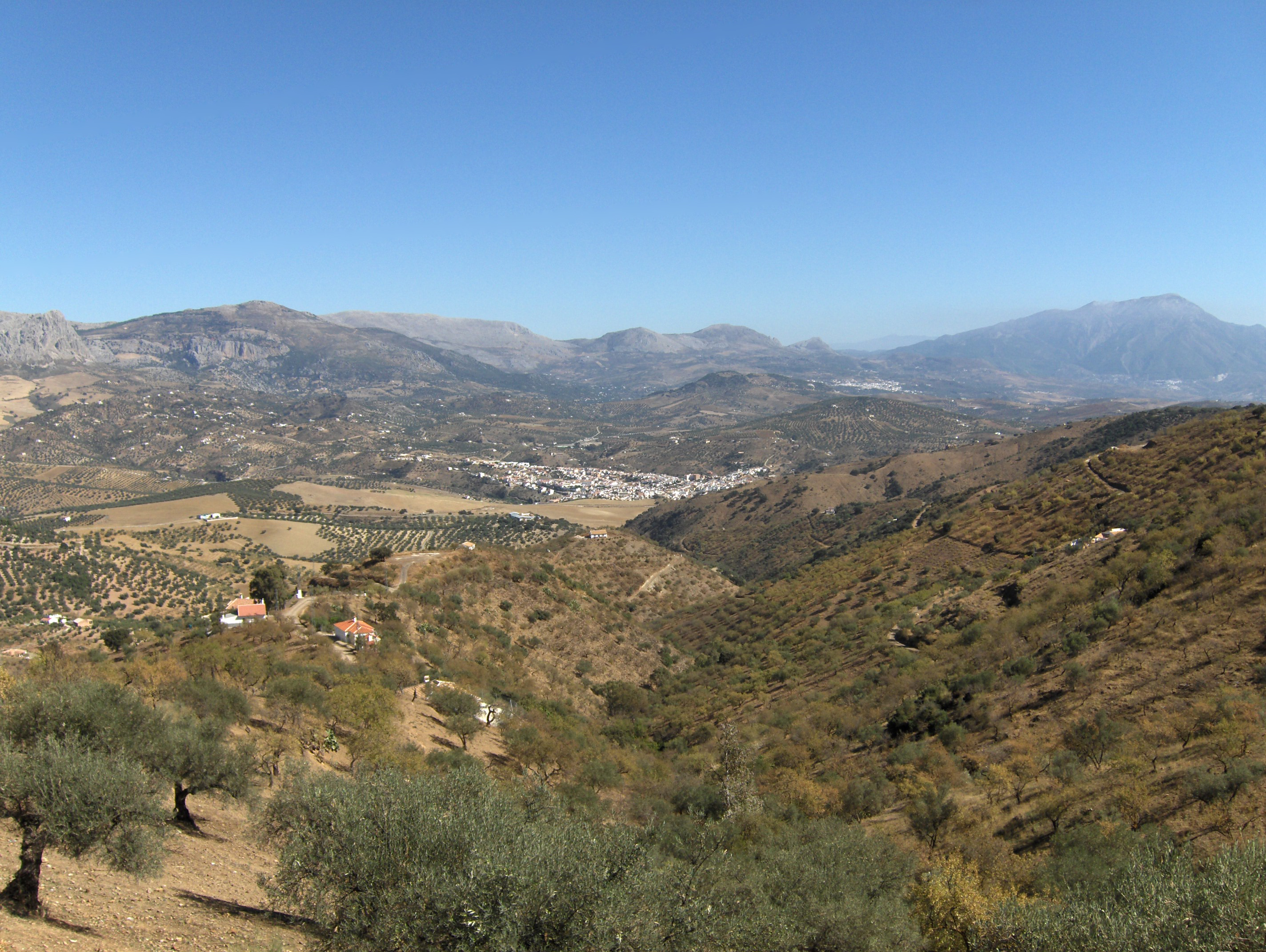 Vista del pueblo de Riogordo y el pico de la Maroma (a la derecha), Málaga, España.